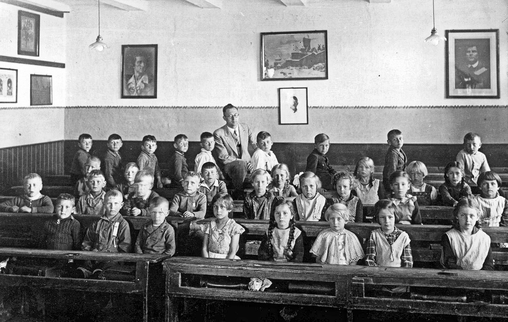 Volksschule Haynrode (1936/37)